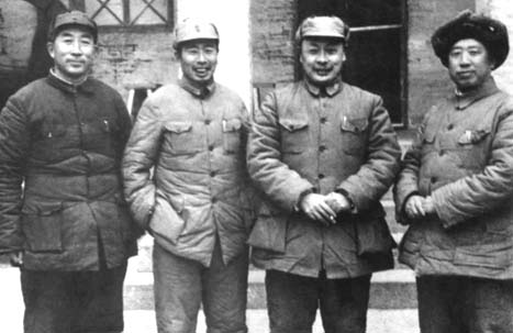 国共内战期间，薄一波、宋任穷、陈毅、滕代远合影